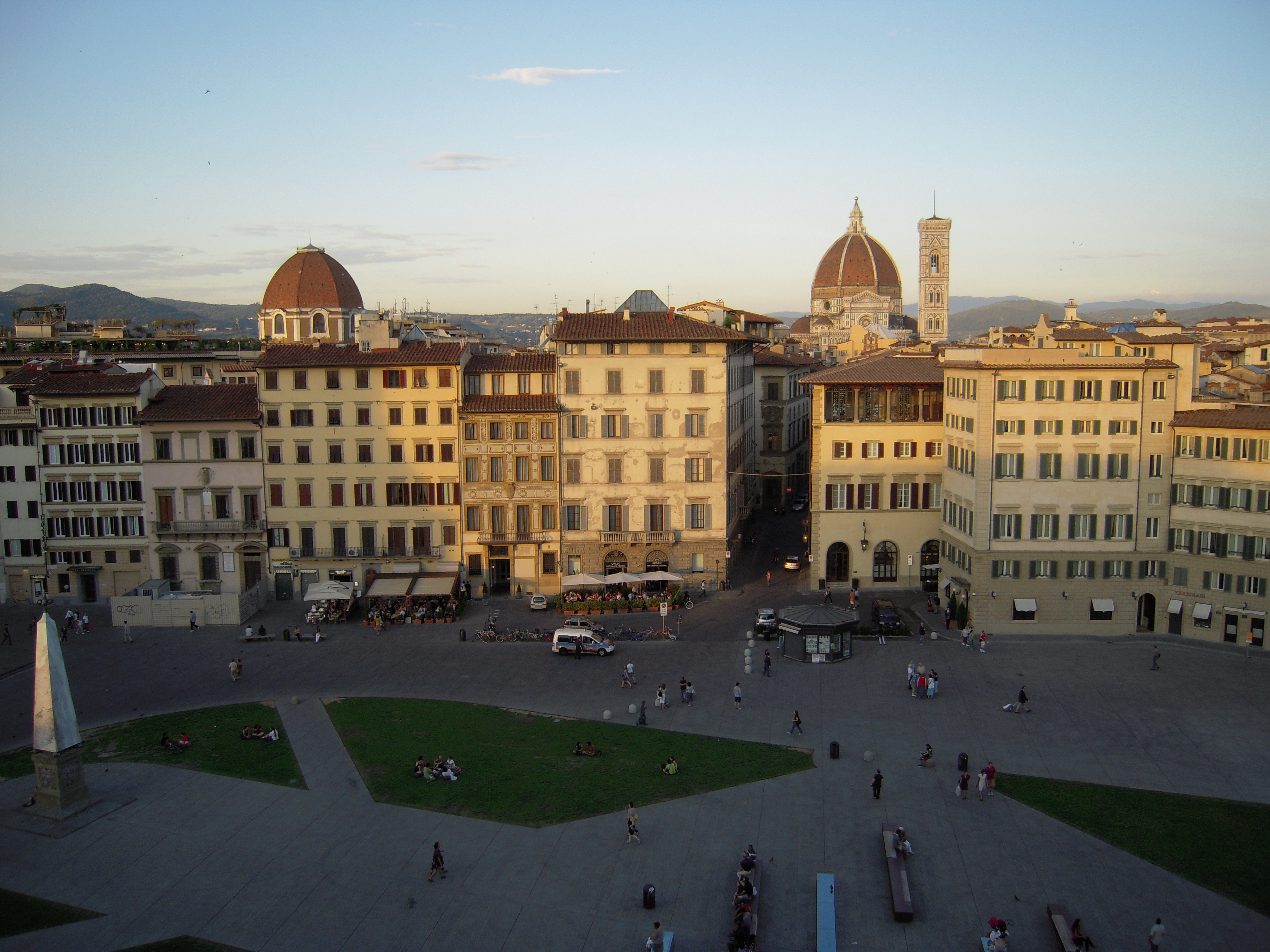 Santa Maria Novella Square